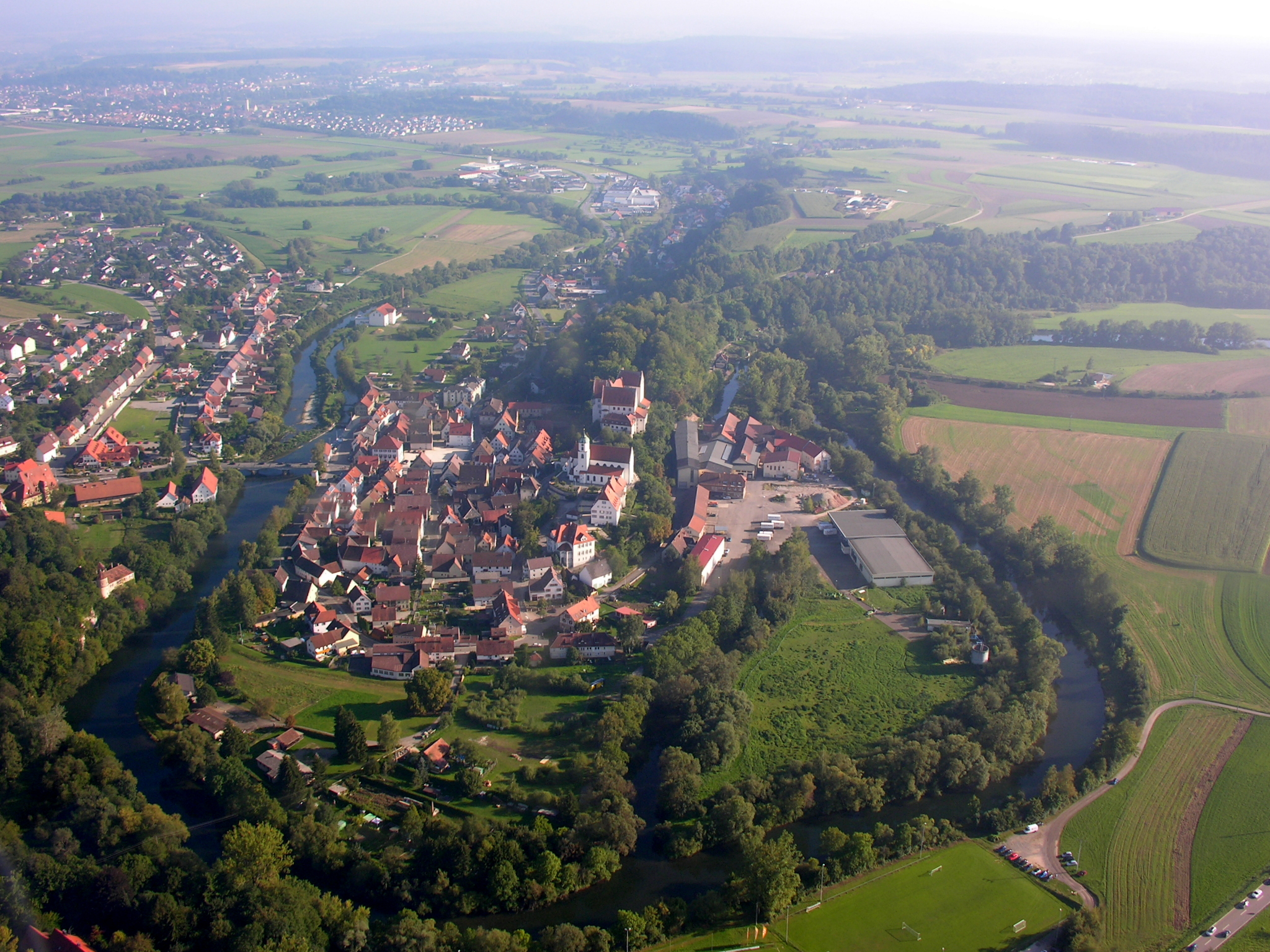 Germany, Baden-Württemberg, Aerial view of Scheer